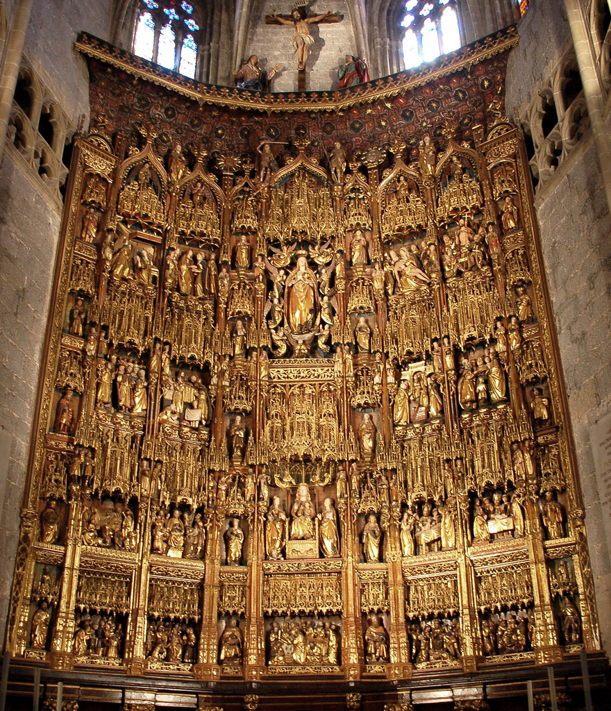 Retablo mayor hispano-flamenco de la Basílica de la Asunción de Nuestra Señora de Lequeitio (Vizcaya, País Vasco, España)